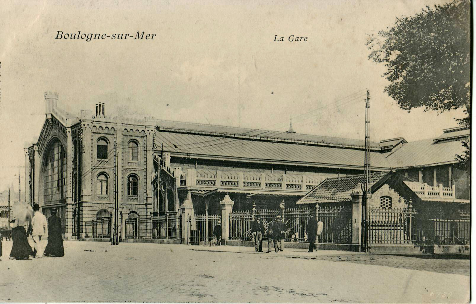 Carte postale ancienne, sans mention d'éditeur : BOULOGNESUR-MER - La Gare